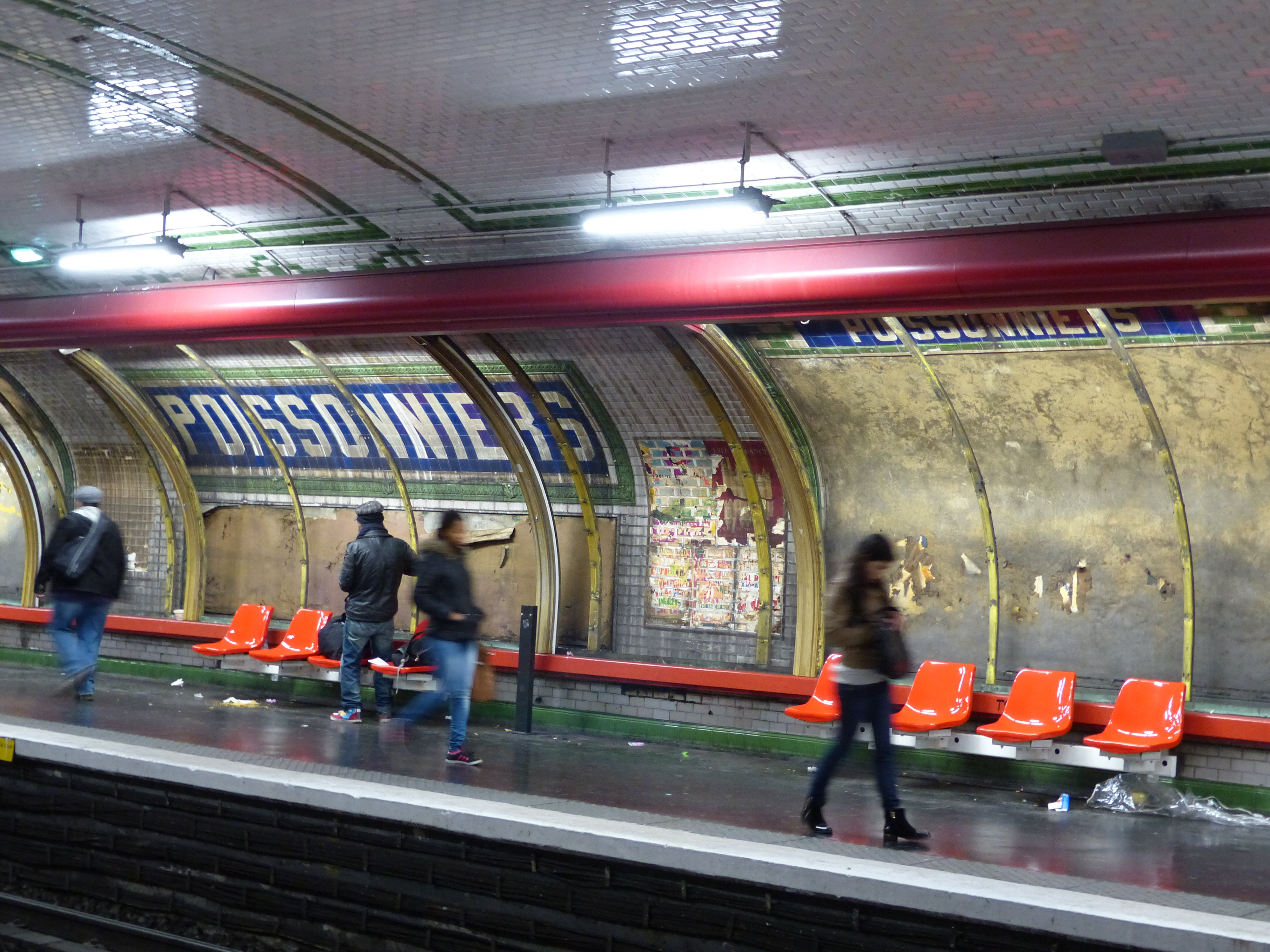 quais de la ligne 12 en 2014. Le décor de l'ancienne station apparaît.